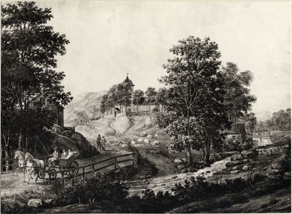 Danska Vägen, uppfart vid Delsjöbäcken mot Örgryte gamla kyrka. Målad av J.F. Weinberg 1811.